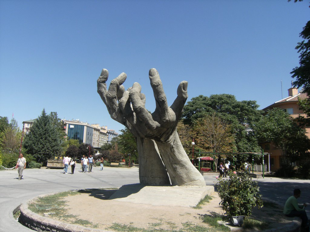 Eller heykeli Metin Yurdanur çalışmasıdır. Ankara Abdi İpekçi parkında yer alır